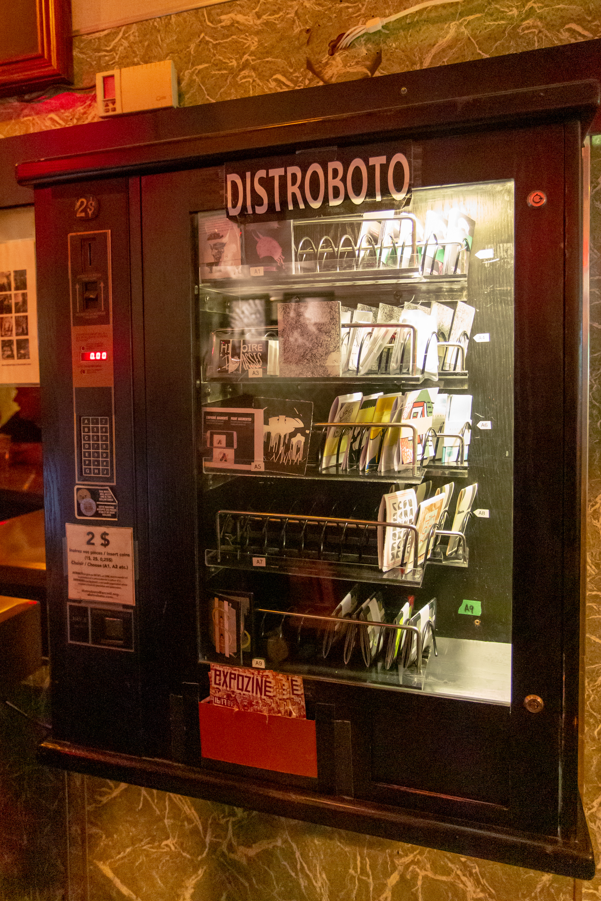 Machine Distroboto, version 2019, se trouvant au Cheval Blanc.